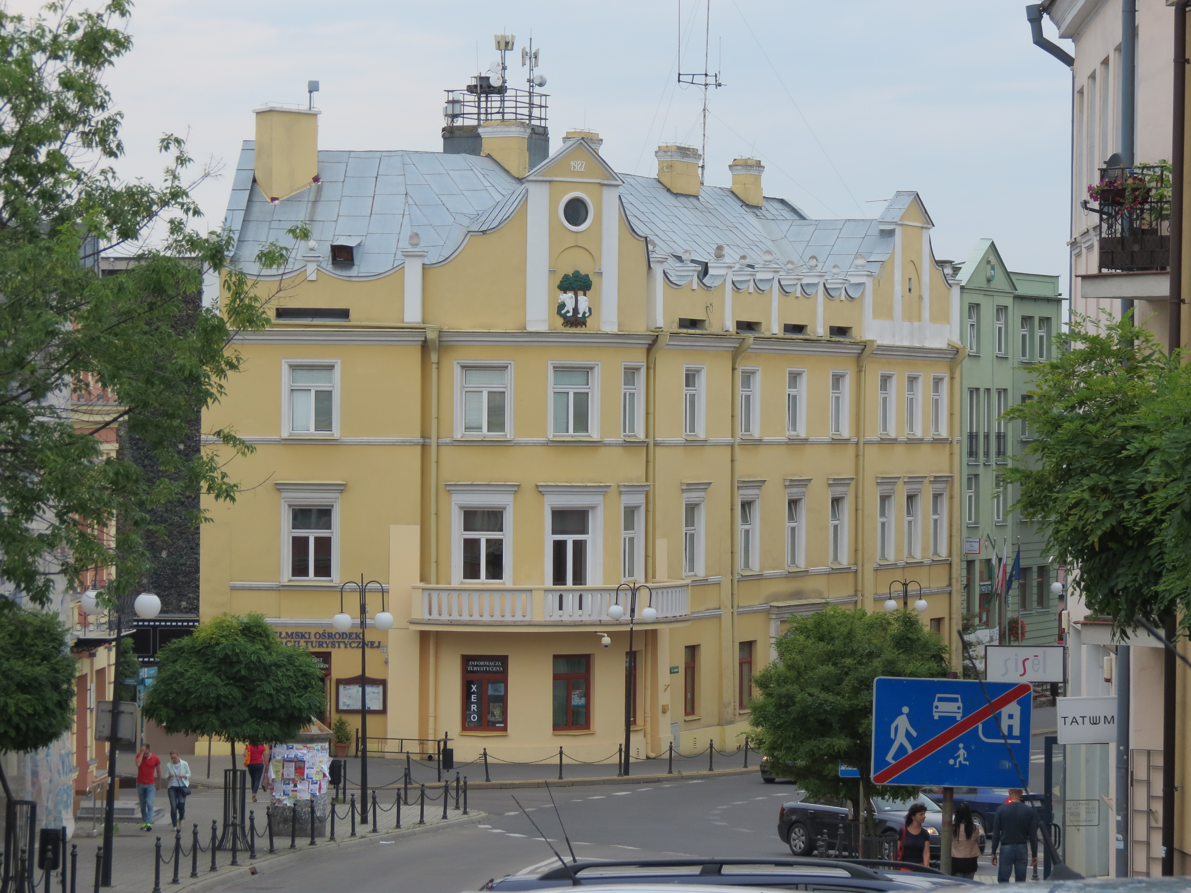 Chełm, magistrat, 1927